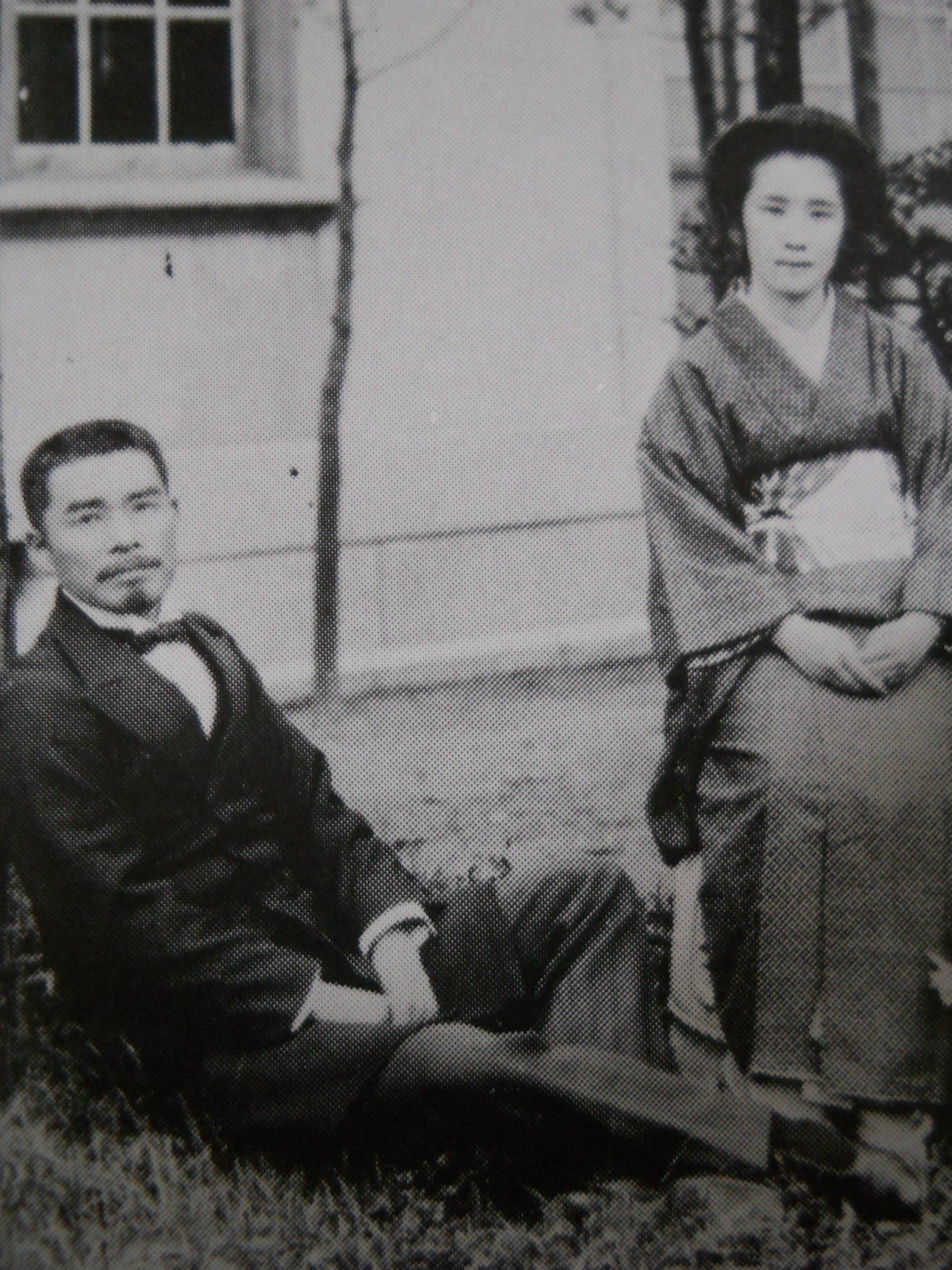 Ｈｉｒａｏｋａ Ｔｅｉｔａｒｏｕ ａｎｄ Ｎａｔｕ